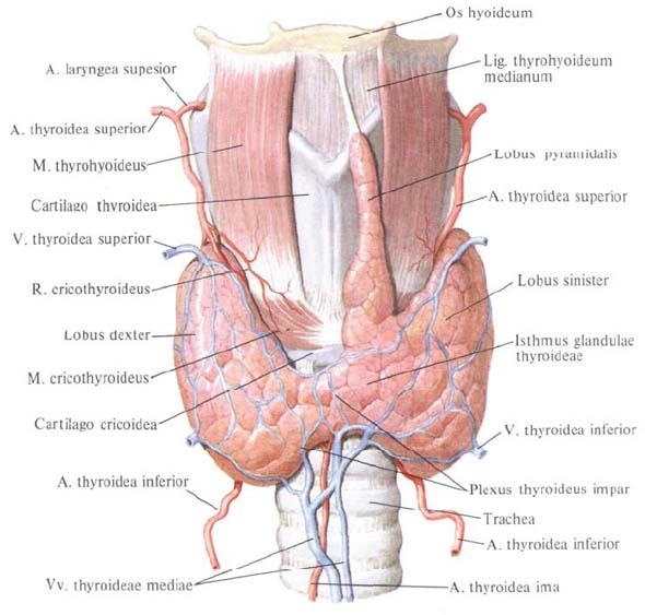 Վահանաձև գեղձ